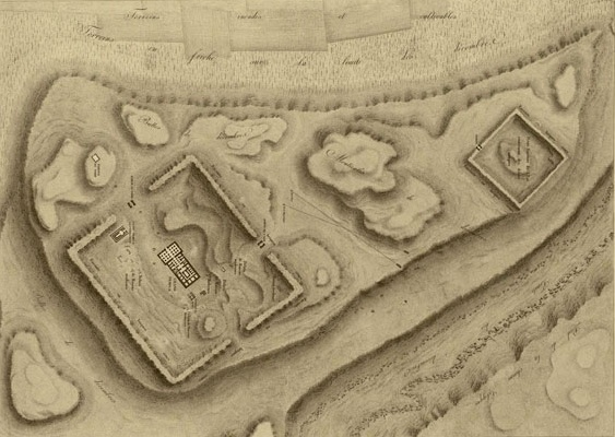 Denderah (Tentyris), plan topographique des ruines